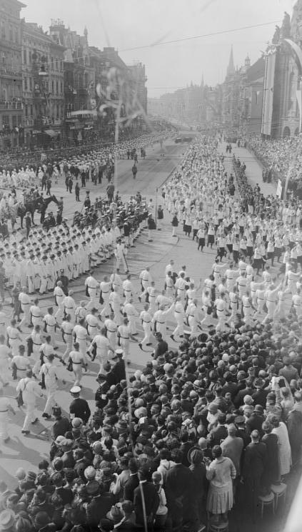 Der große Festzug der 200.000 Turner durch die Strassen Kölns. Blick auf den großen Ring in Köln während des Durchzuges der 200.000 Turner durch die festlich geschmückten Strassen.